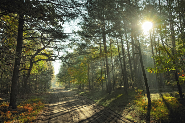 Rezerwat przyrody Jata